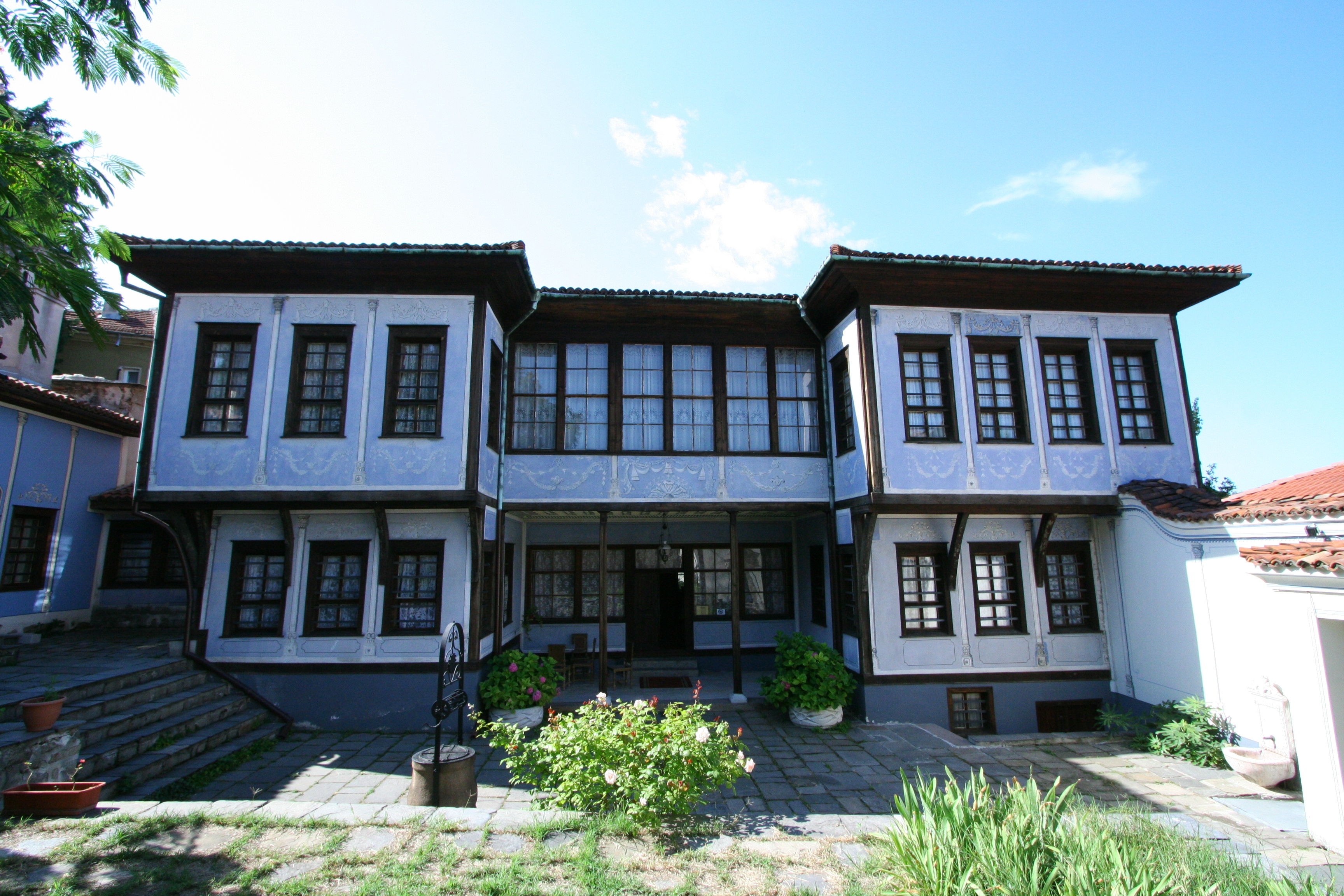 Casa Hindliyan - 01